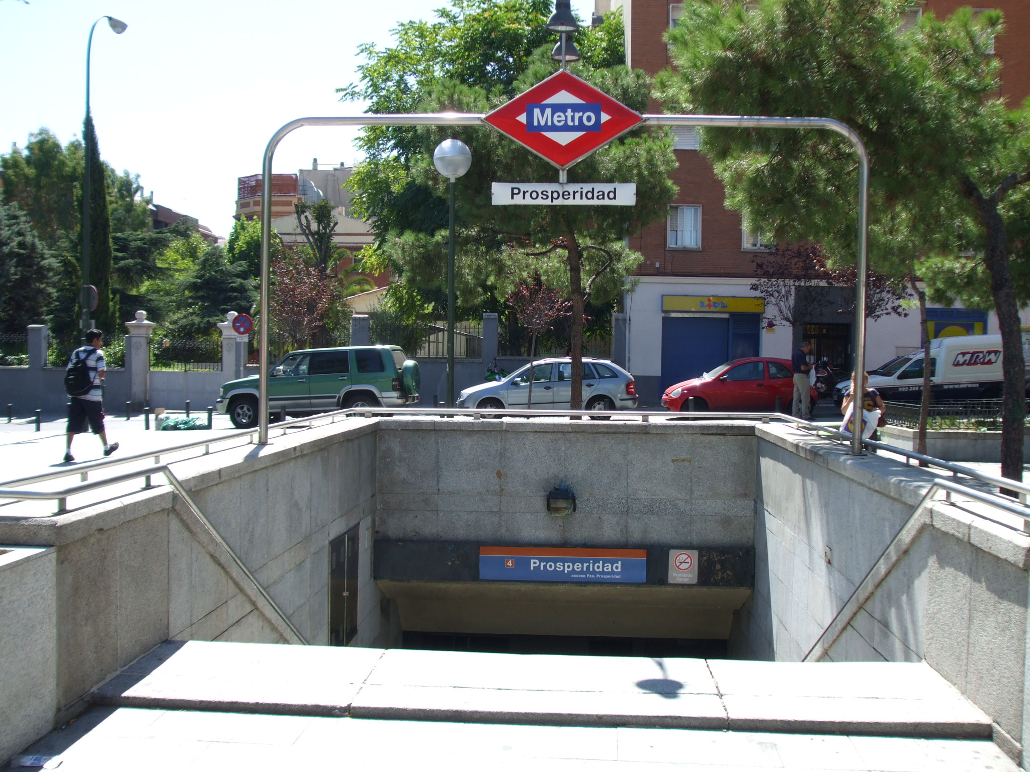 Estación de Prosperidad